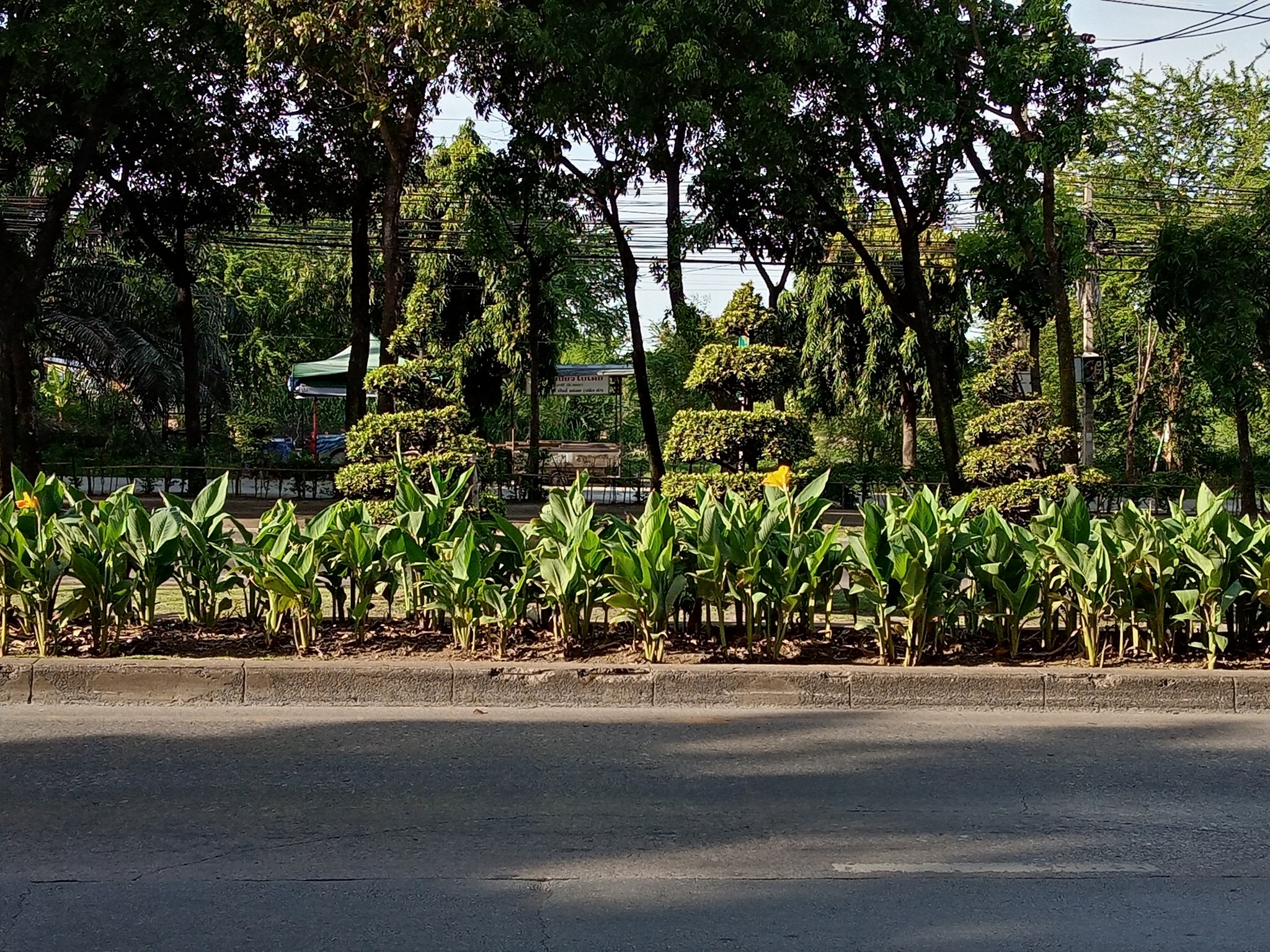 แปลงปลูกดอกพุทธรักษา เกาะกลางถนนเพชรเกษม เขตหนองแขม